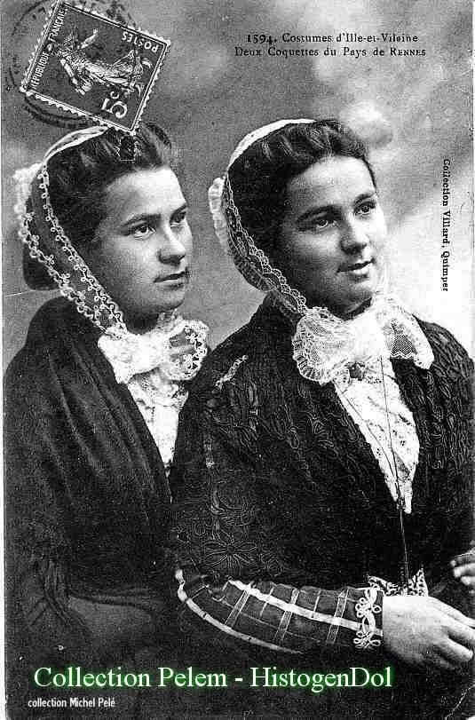 Polka Rennaise - Coiffe bretonne d'ille-et-vilaine